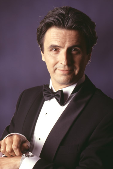 Piotr Polk